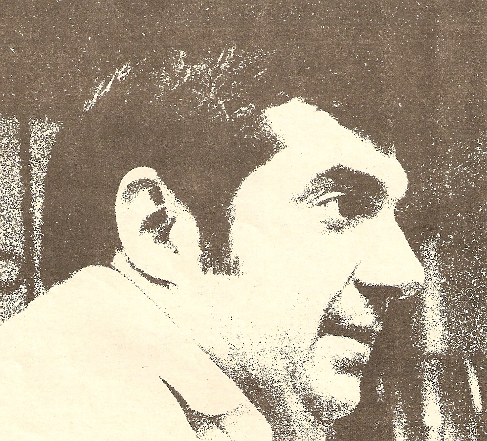 Humberto Ortiz actor argentino (el "Coquito" de "Piluso y Coquito"